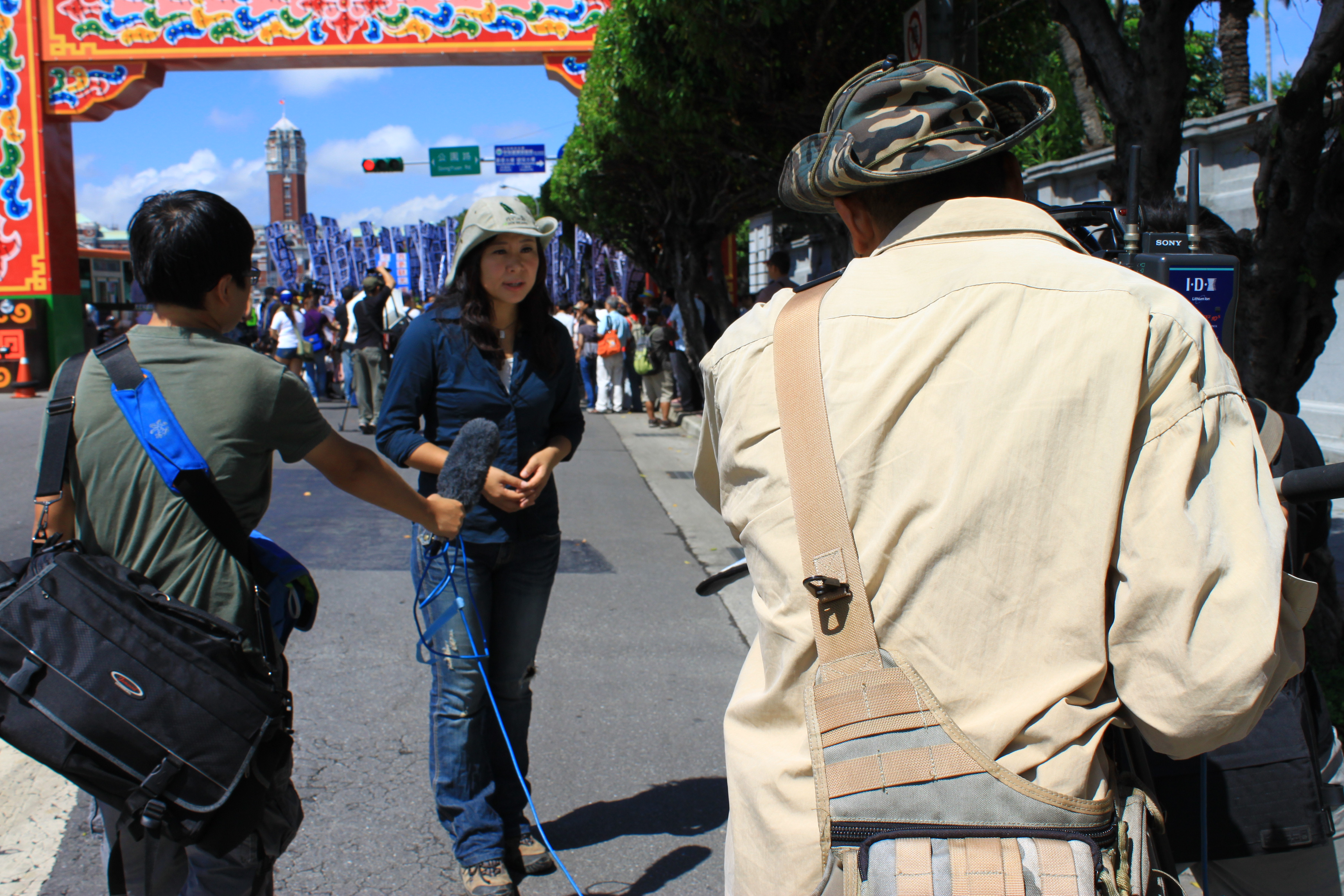 臺北市中正區凱達格蘭大道，公共電視文化事業基金會節目《我們的島》採訪反國光石化遊行。講話者為公共電視文化事業基金會新聞部《我們的島》製作人兼主持人于立平。